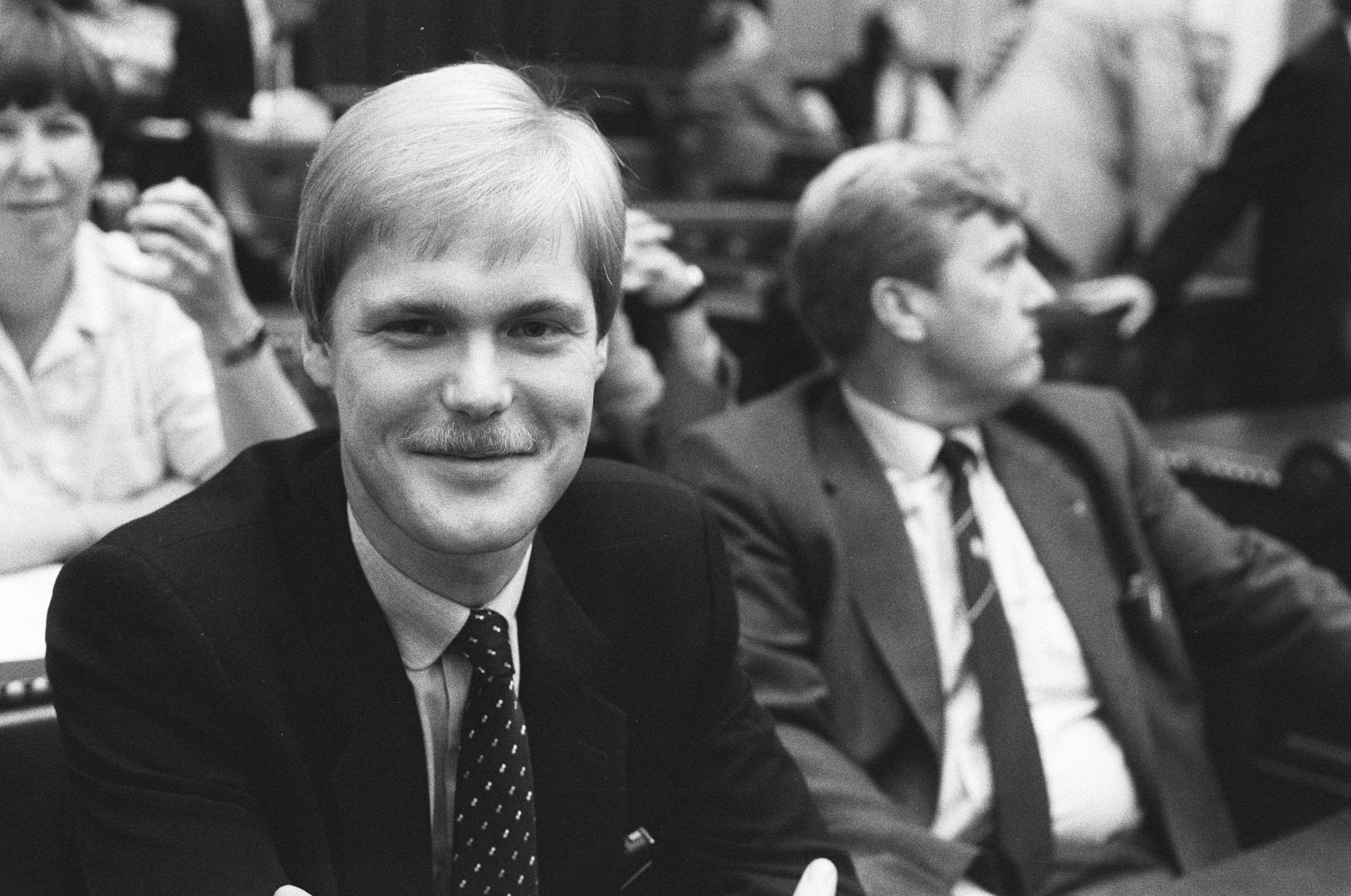 Collectie / Archief : Fotocollectie Anefo Reportage / Serie : Tweede Kamer Beschrijving : Robin Linschoten (VVD) is met 25 jaar het jongste kamerlid Datum : 28 september 1982 Locatie : Den Haag, Zuid-Holland Trefwoorden : parlementariërs, politiek, portretten Persoonsnaam : Linschoten, Robin Fotograaf : Croes, Rob C. / Anefo Auteursrechthebbende : Nationaal Archief Materiaalsoort : Negatief (zwart/wit) Nummer archiefinventaris : bekijk toegang 2.24.01.05 Bestanddeelnummer : 932-3446